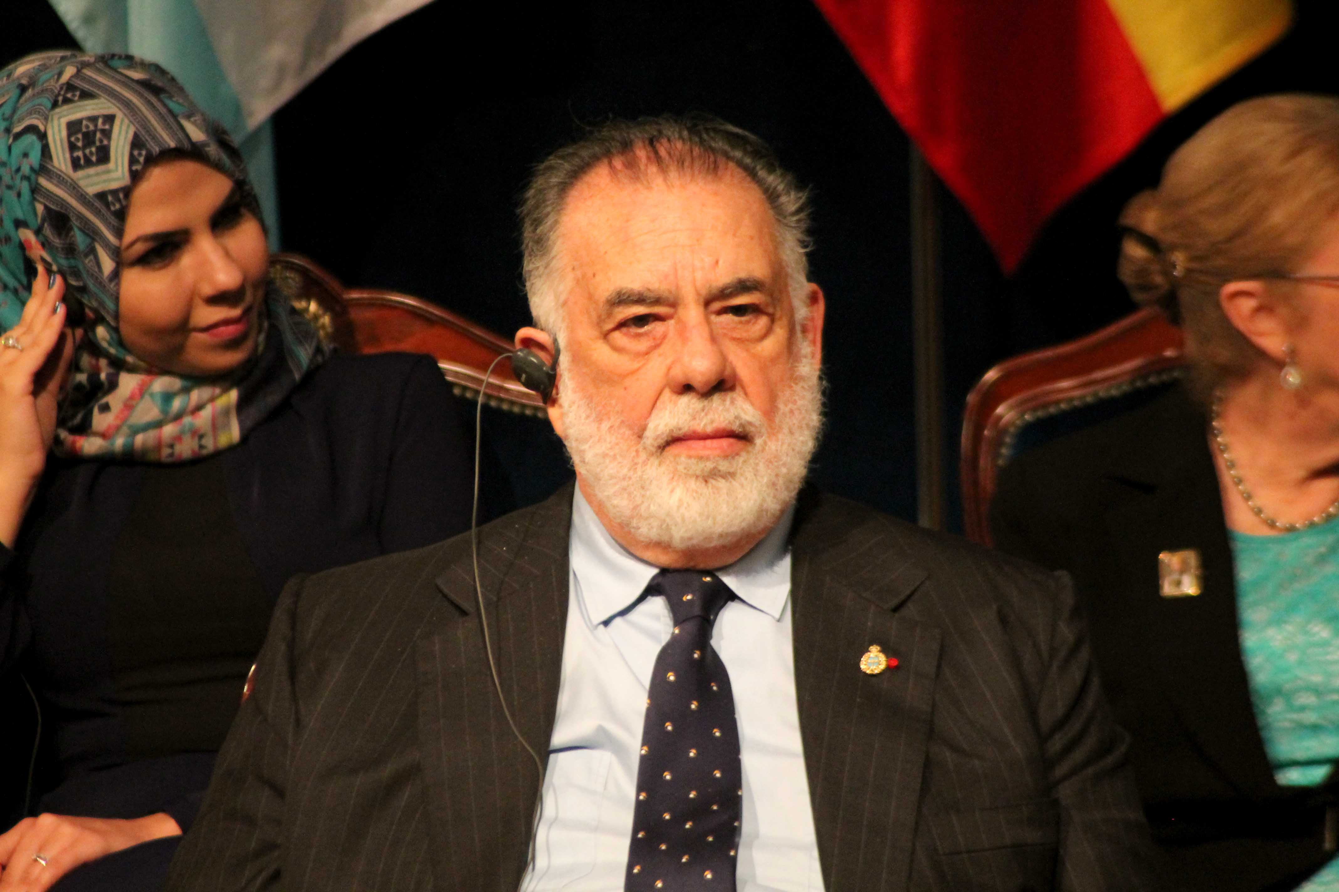 Premios Princesa de Asturias 2015